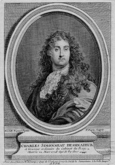 Portrait of Charles Simonneau (1645-1728)